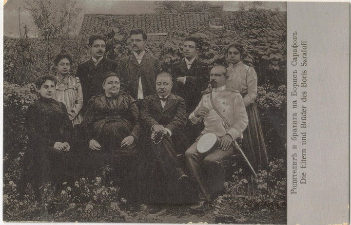 Петър Сарафов, синът му Борис Сарафов и семейството им.